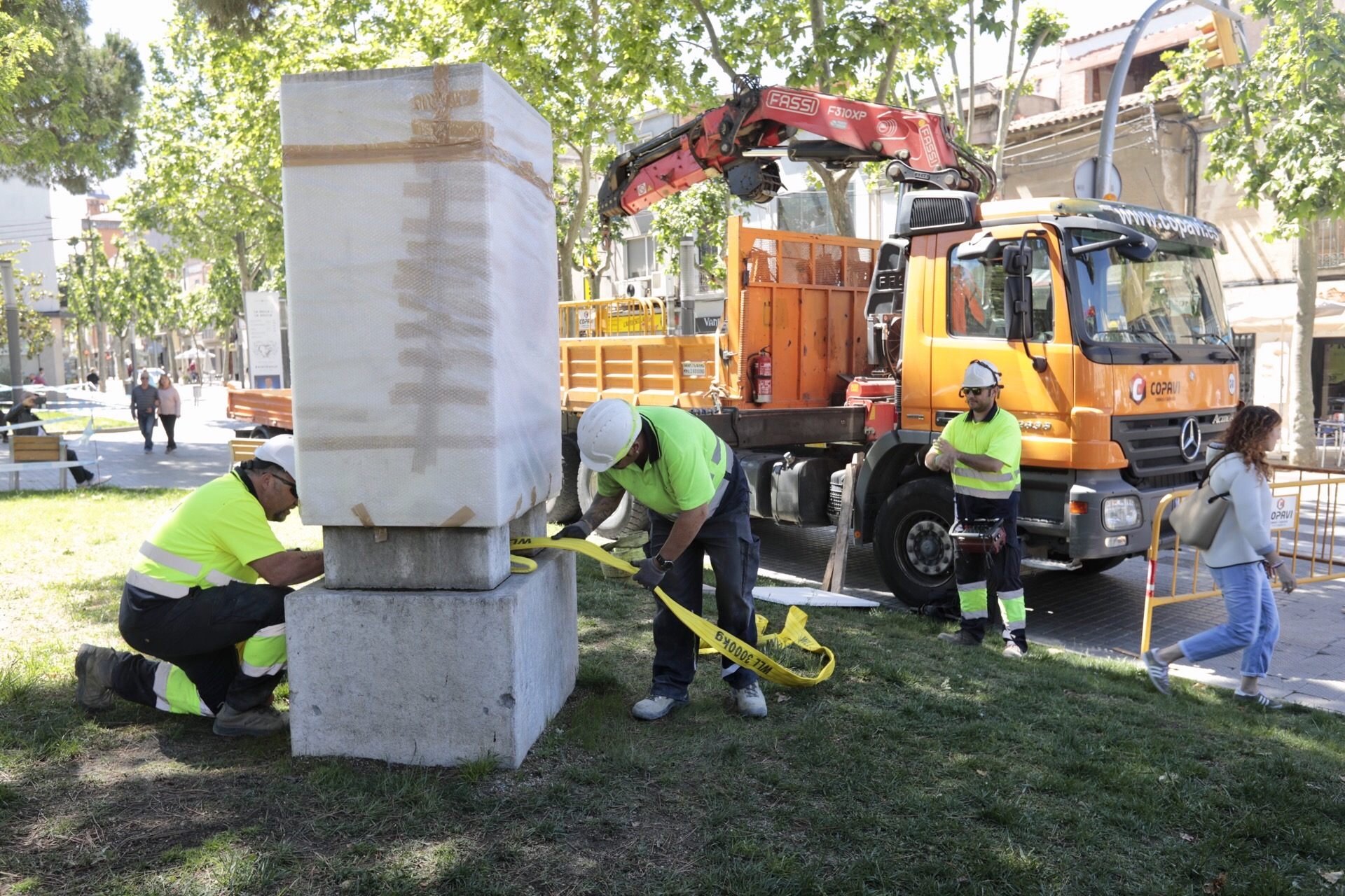 © Foto: Ajuntament de Sabadell / Juanma Peláez Presentació de les actuacions vinculades a la memòria històrica i retirada monolit alcalde Marcet